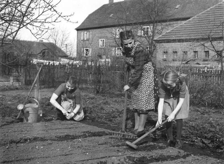 Gartenarbeit Zentralbild Klein 1.4.1953 Der erste Frauenbahnhof der Deutschen Demokratischen Republik. Im Industriekreis Senftenberg wurde im März 1953 zum Internationen Frauentag der erste Frauenbahnhof der Deutschen Demokratischen Republik eingerichtet. "Großräschen-Süd" ist damit die erste, nur von Frauen besetzte Dienststelle der Deutschen Reichsbahn. Leiterin dieses Bahnhofes ist die erst 18 jährige Gerda Drogan, die wie alle anderen Mitglieder der Belegschaft im Demokratischen Frauenbund organisiert ist. UBz: Nach Feierabend arbeitet Kollegin Walter gern mit ihren beiden Töchtern Rosi und Uschi im Garten.